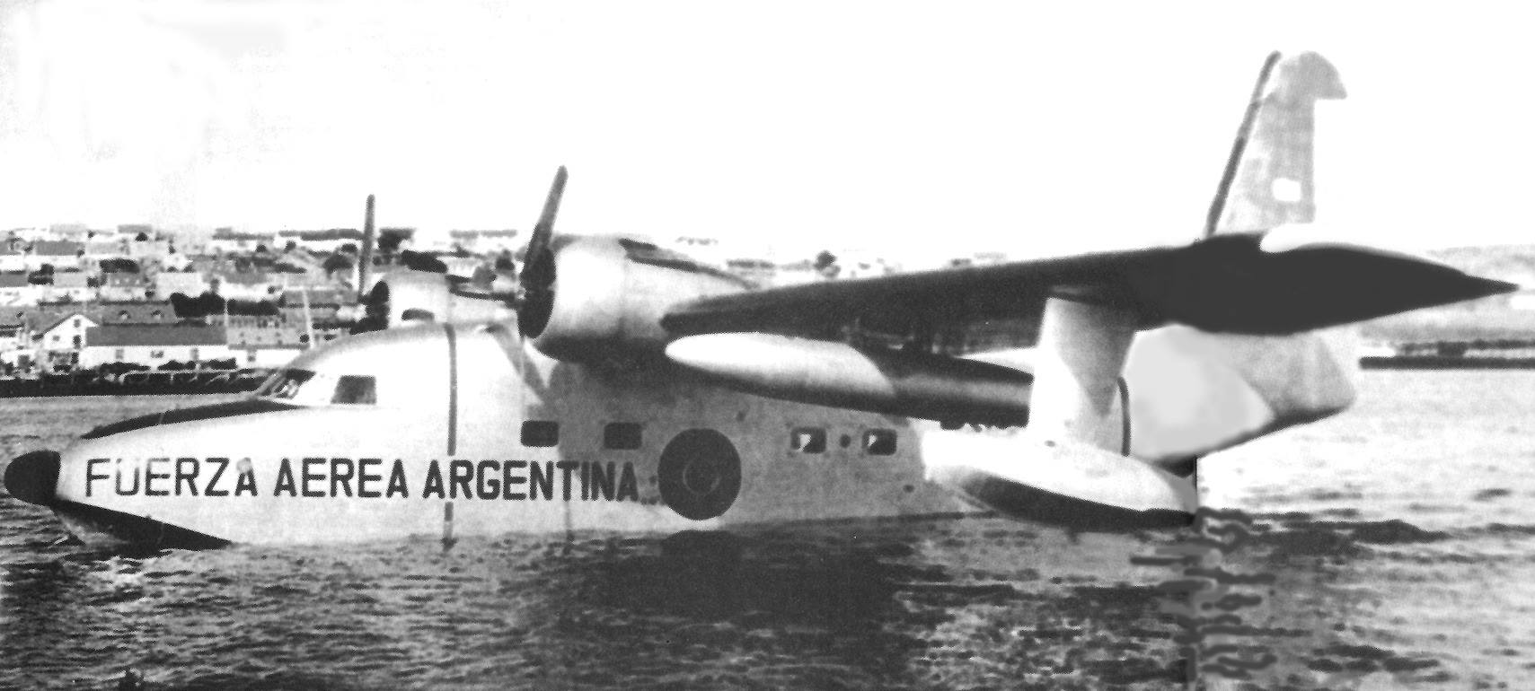 El 12 de enero de 1972, Líneas Aéreas del Estado (LADE) inicia el servicio regular a las Islas Malvinas con un anfibio Albatross matrícula BS-02. La tripulación estaba compuesta por el capitán José A. Demarco, comandante de aeronave; capitán Ángel G. Toribio, primer piloto; primer teniente Francisco F. Mensi, navegador; suboficial Rubén C. Bidegain, mecánico; y cabo principal Juan C. Scianca, radiooperador.